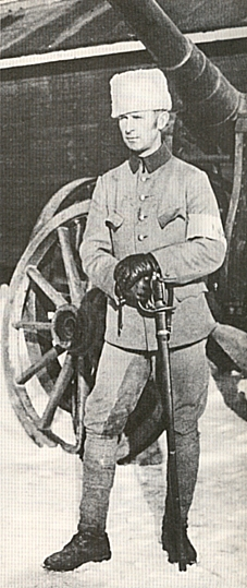 Kreivi Adolf Hamilton